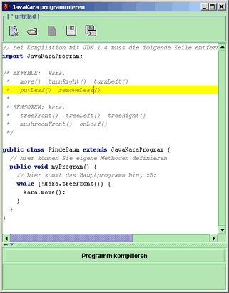 KaraToJava: JavaKara Programmeditor.